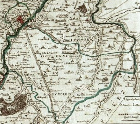 Carte des doyennés de Caen et de Vaucelles, extraite de la Carte topographique du diocèse de Bayeux